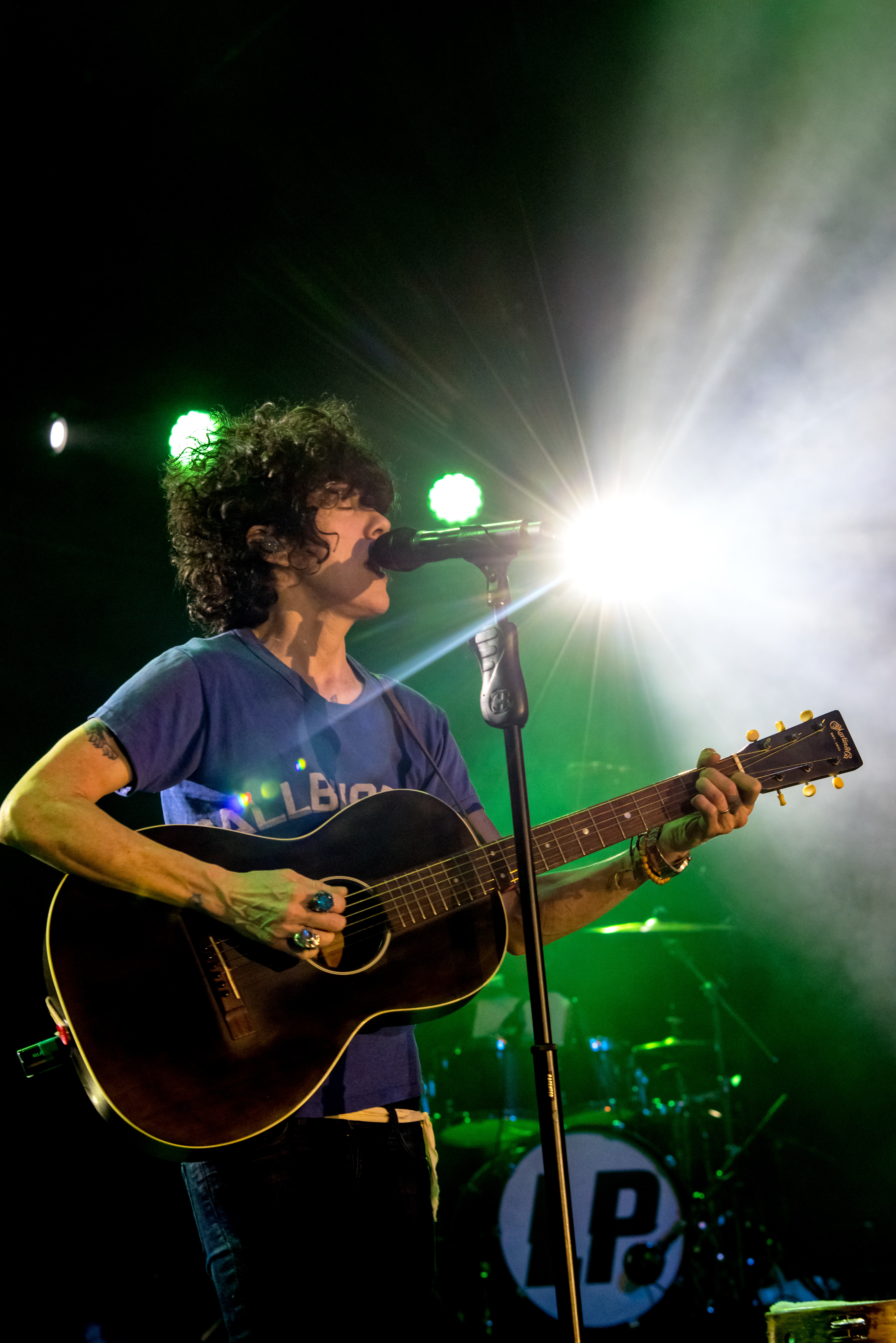 Bilder vom Zelt Musik Festival 2018 in Freiburg im Breisgau LP am 28.07.2018 im Zirkuszelt